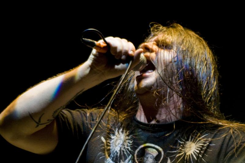 Cannibal Corpse Live @ Santana Hall - 21/02/2010 - São Paulo, Brasil É proibida a cópia ou reprodução deste material sem a autorização do autor. Por favor, não publique nada daqui sem o devido crédito. Fotógrafo: Alexandre Cardoso